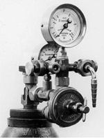 Клапан Любека (Lubeca-Ventil)